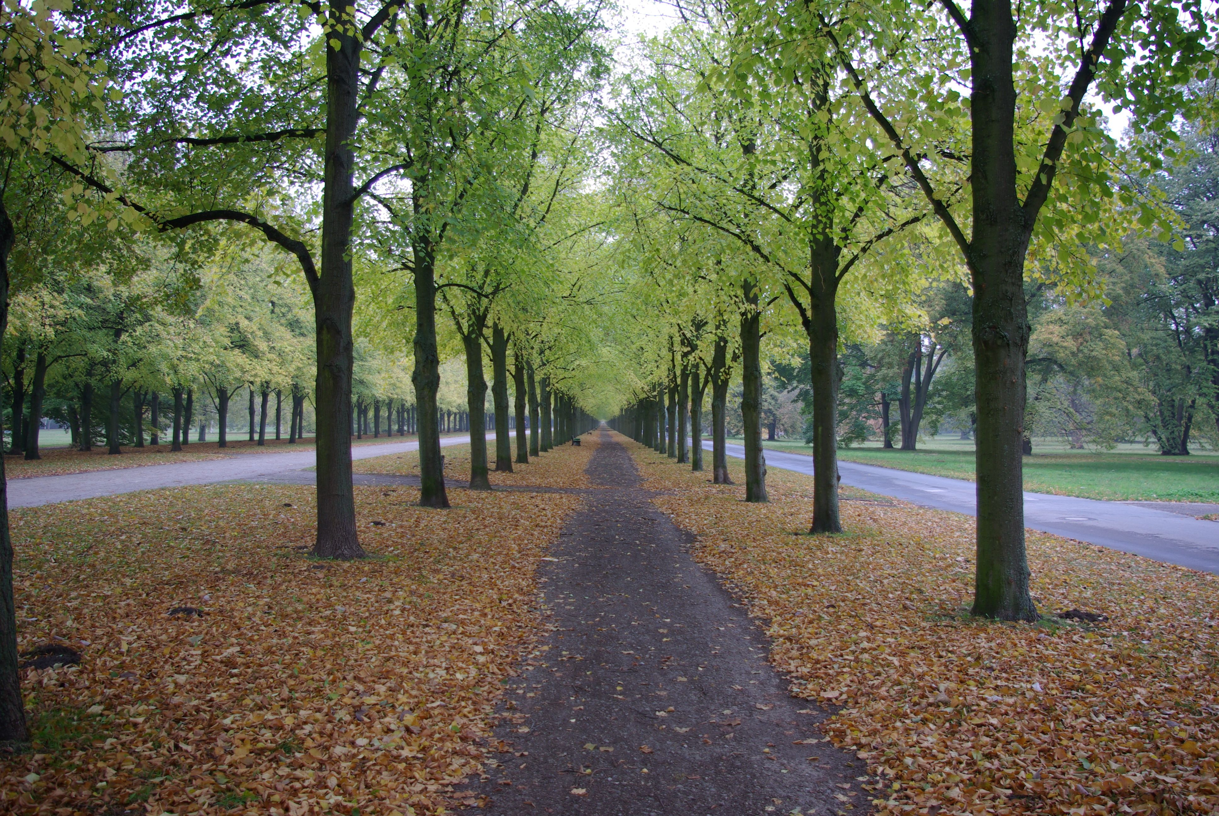 Hannover in Niedersachsen. Die Herrenhäuser Allee verbindet Hannover mit Herrenhausen.